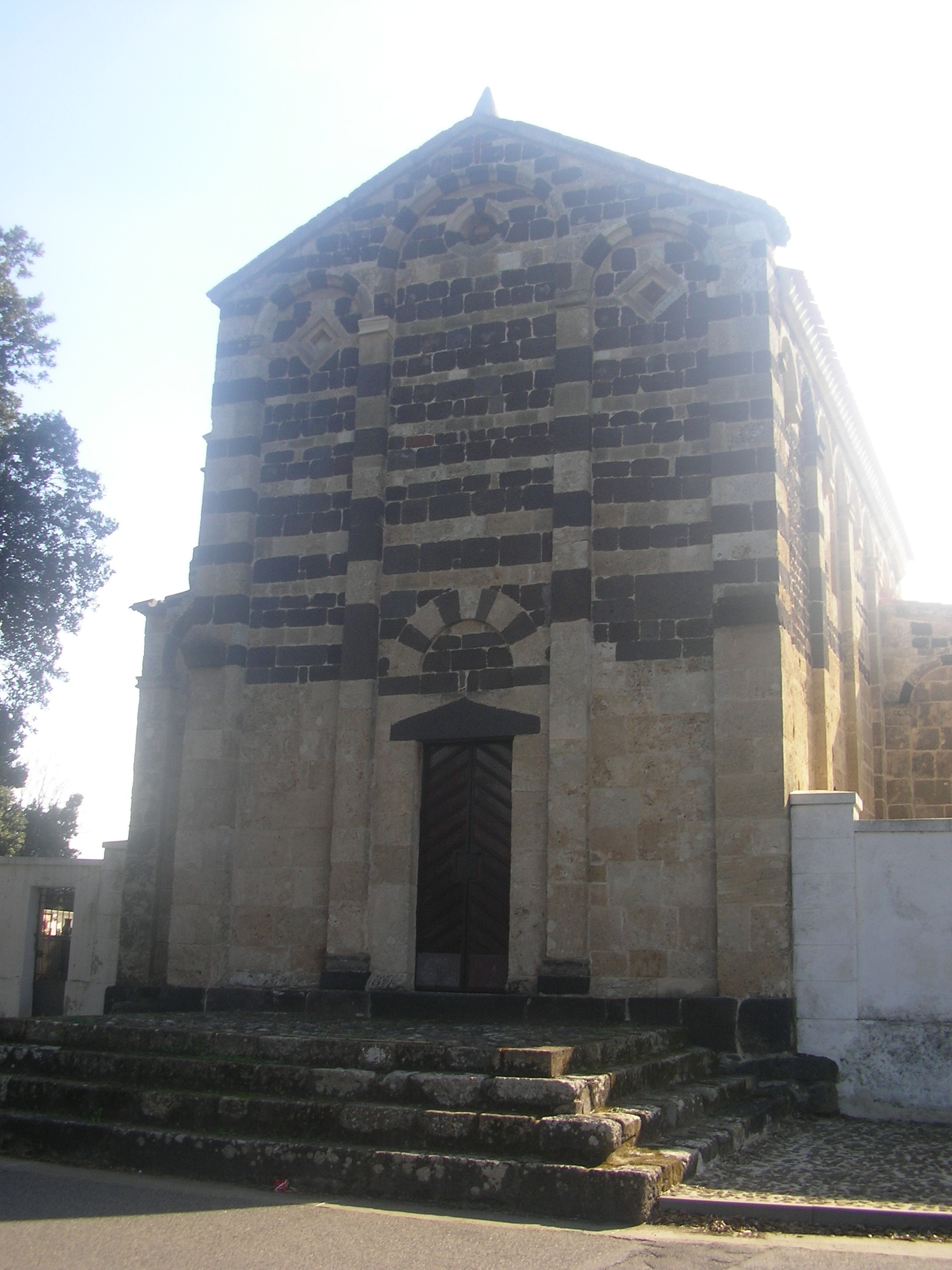 chiesa di san Paolo